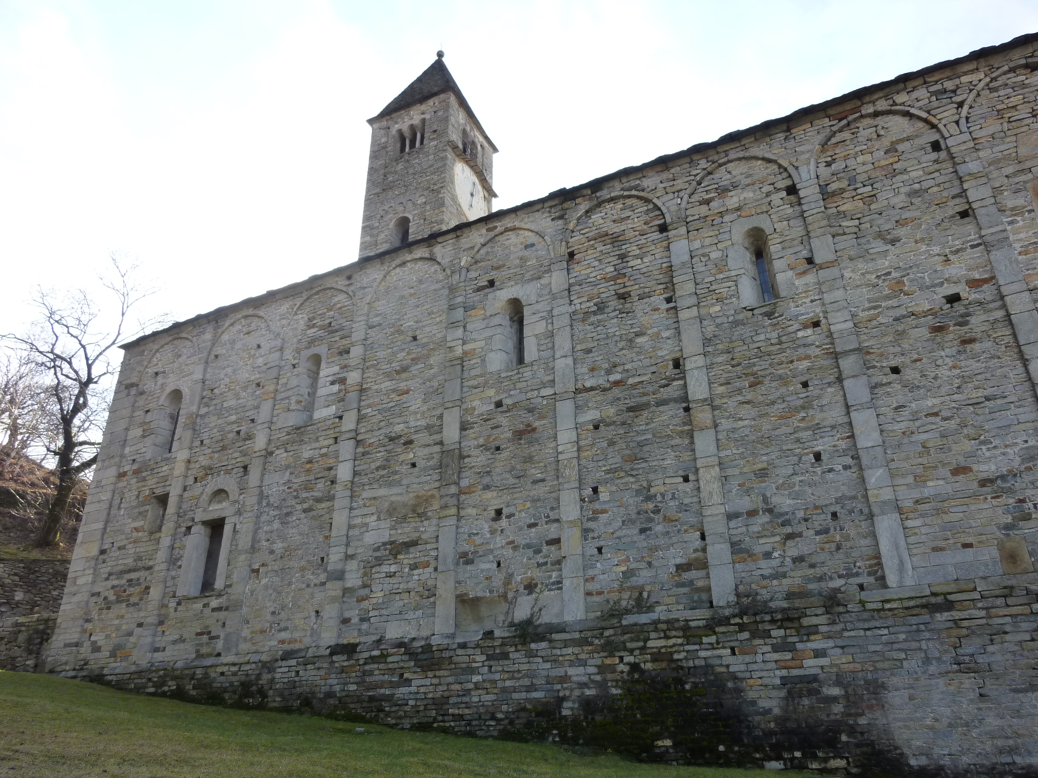 Kirche San Pietro e Paolo (Biasca) Nordfassade